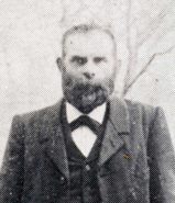 Jan Huges (1861-1939), burgemeester van Gasselte